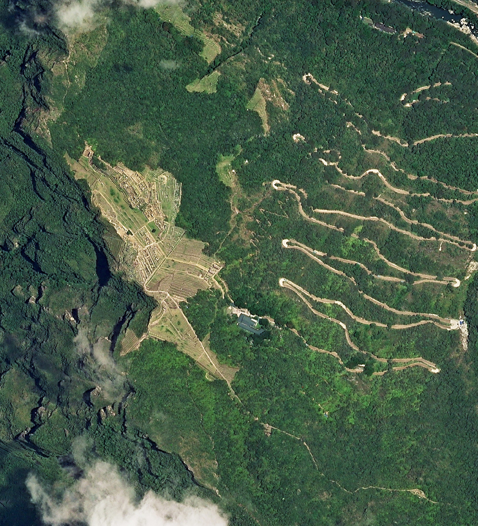 Vista aérea de Machu Picchu, captada por el satélite PerúSat-1